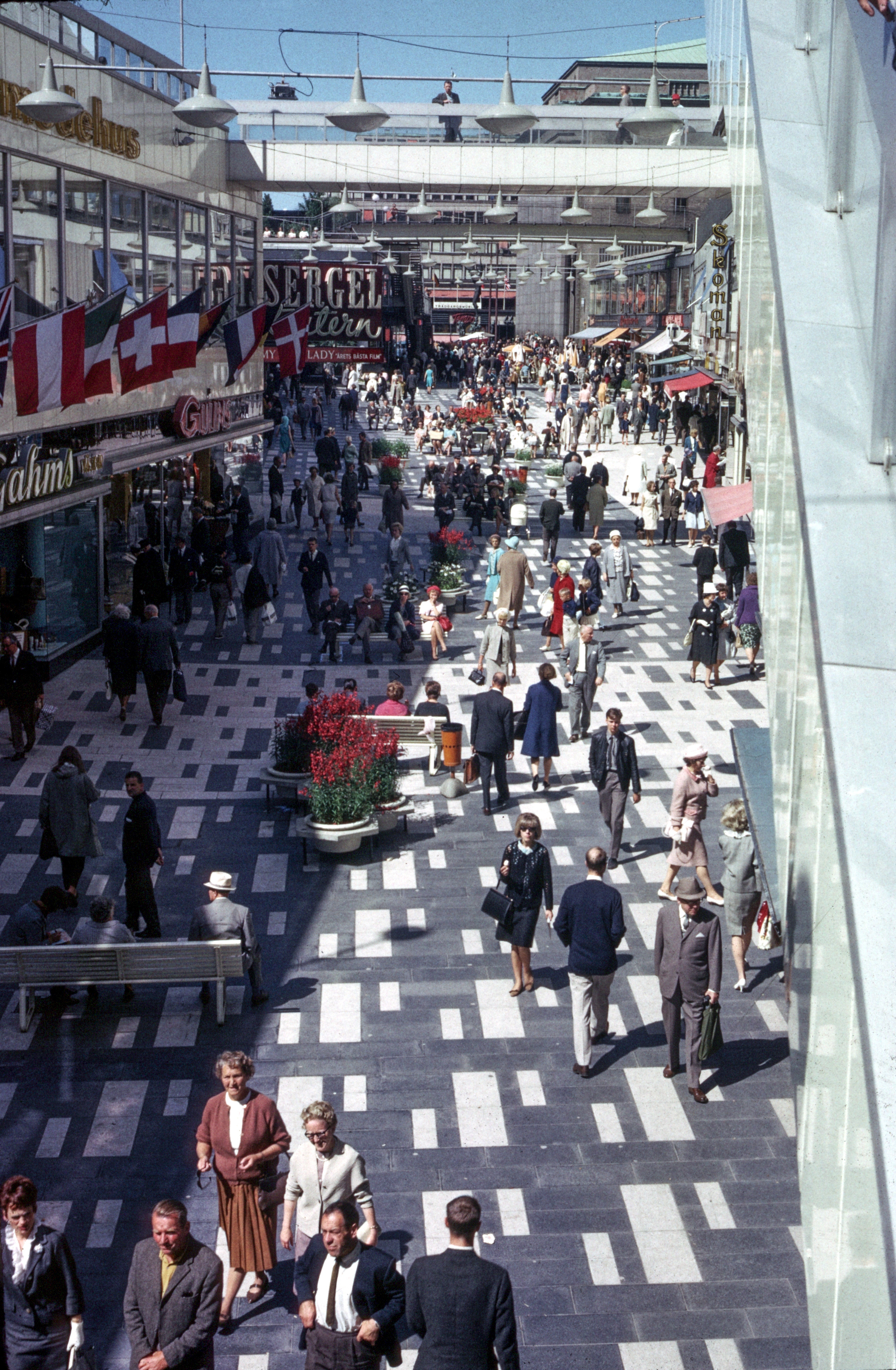 Sergelgatan i Stockholm i riktning mot Hötorget, en sommardag 1965